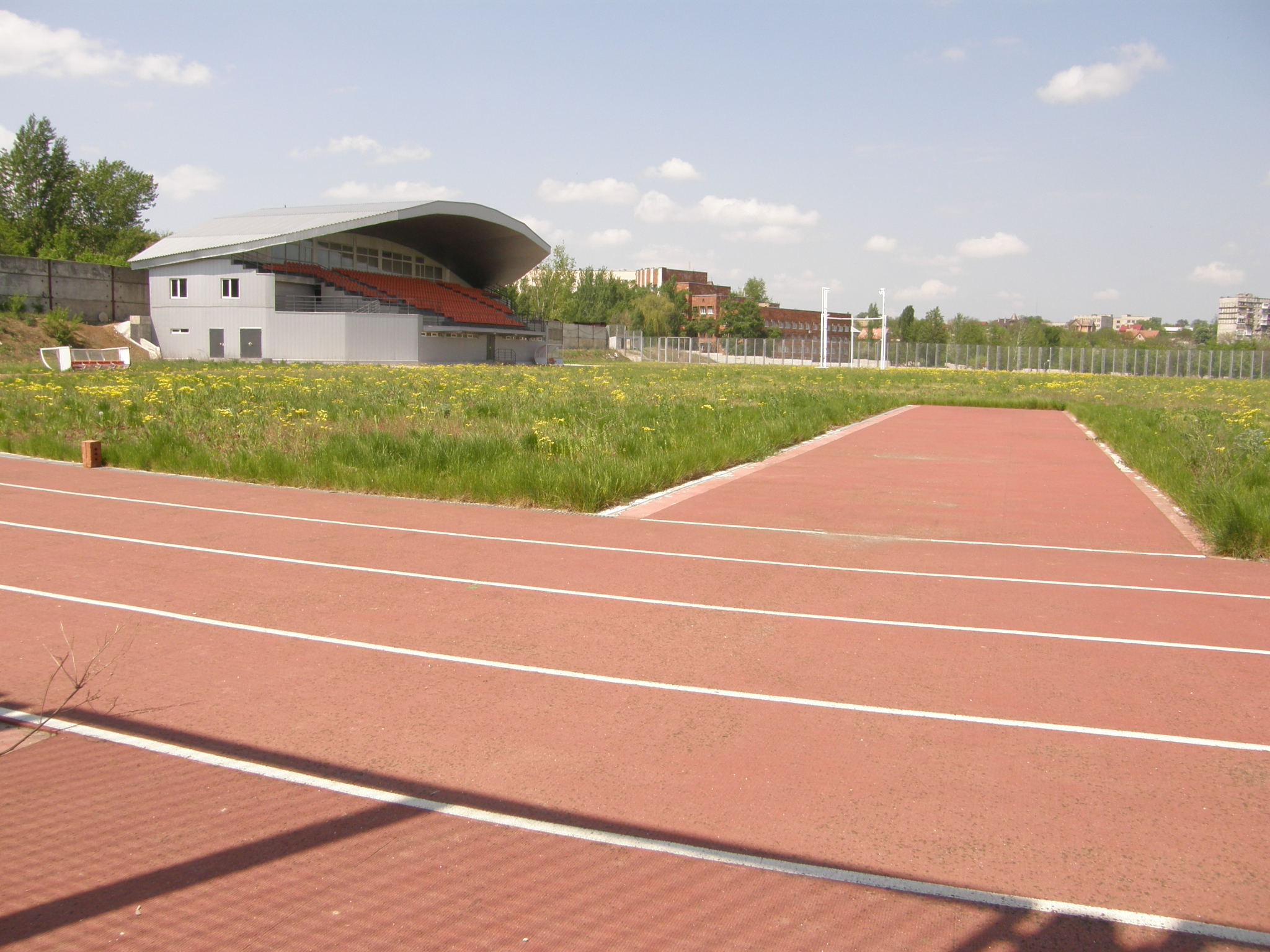 Донецк. Метательно-разминочный стадион - Подразделение РСК «Олимпийский»